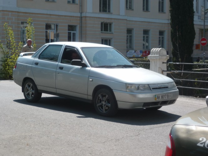 Une Lada 110 photographiée à Yalta (Ukraine).